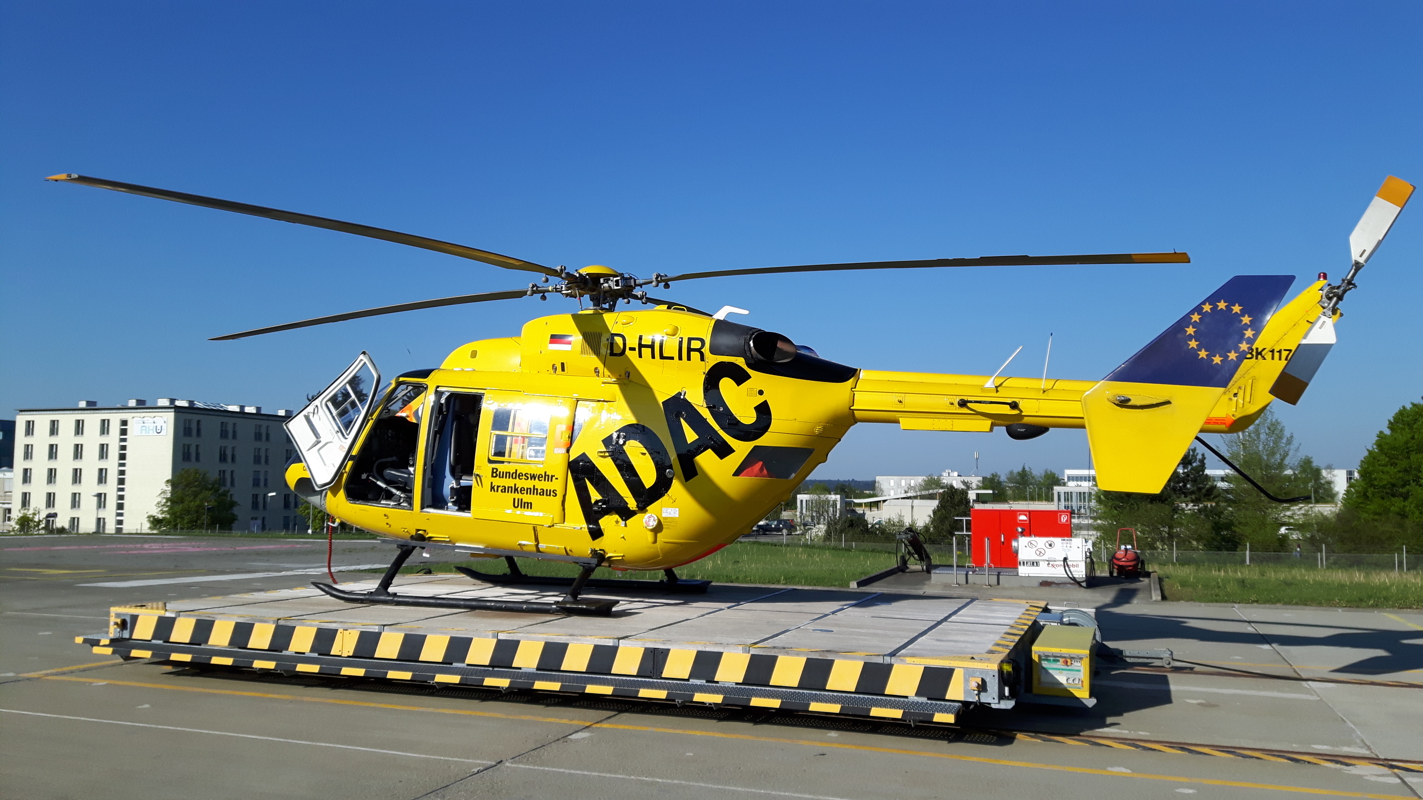 BK-117 C1 mit der Kennung D-HLIR als Stammmaschine von Christoph 22